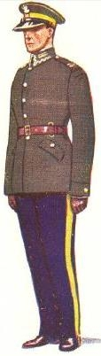 1935 kapral 3 pulku szwoleżerów; ubiór wieczorowy